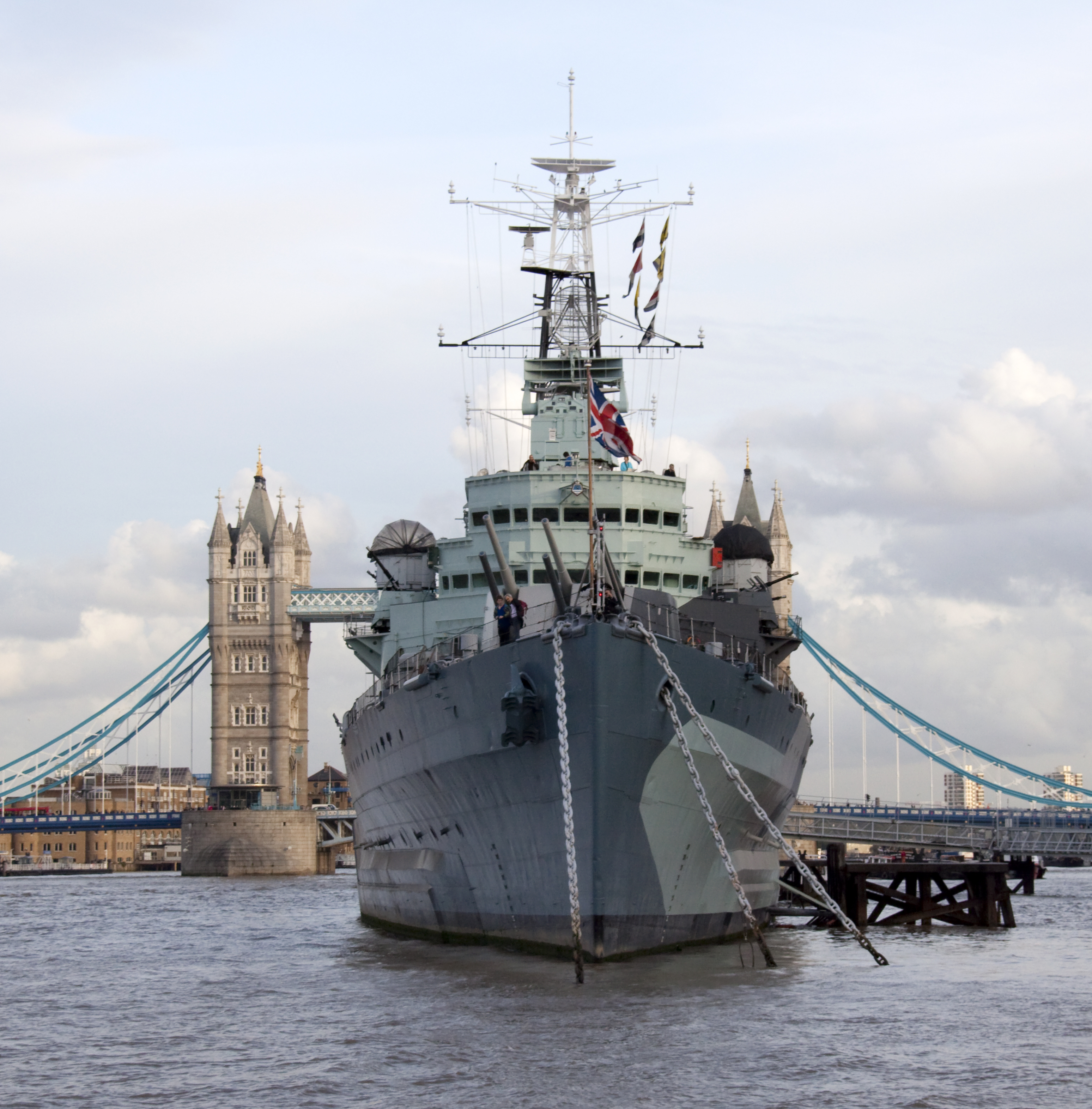 HMS Belfast 3